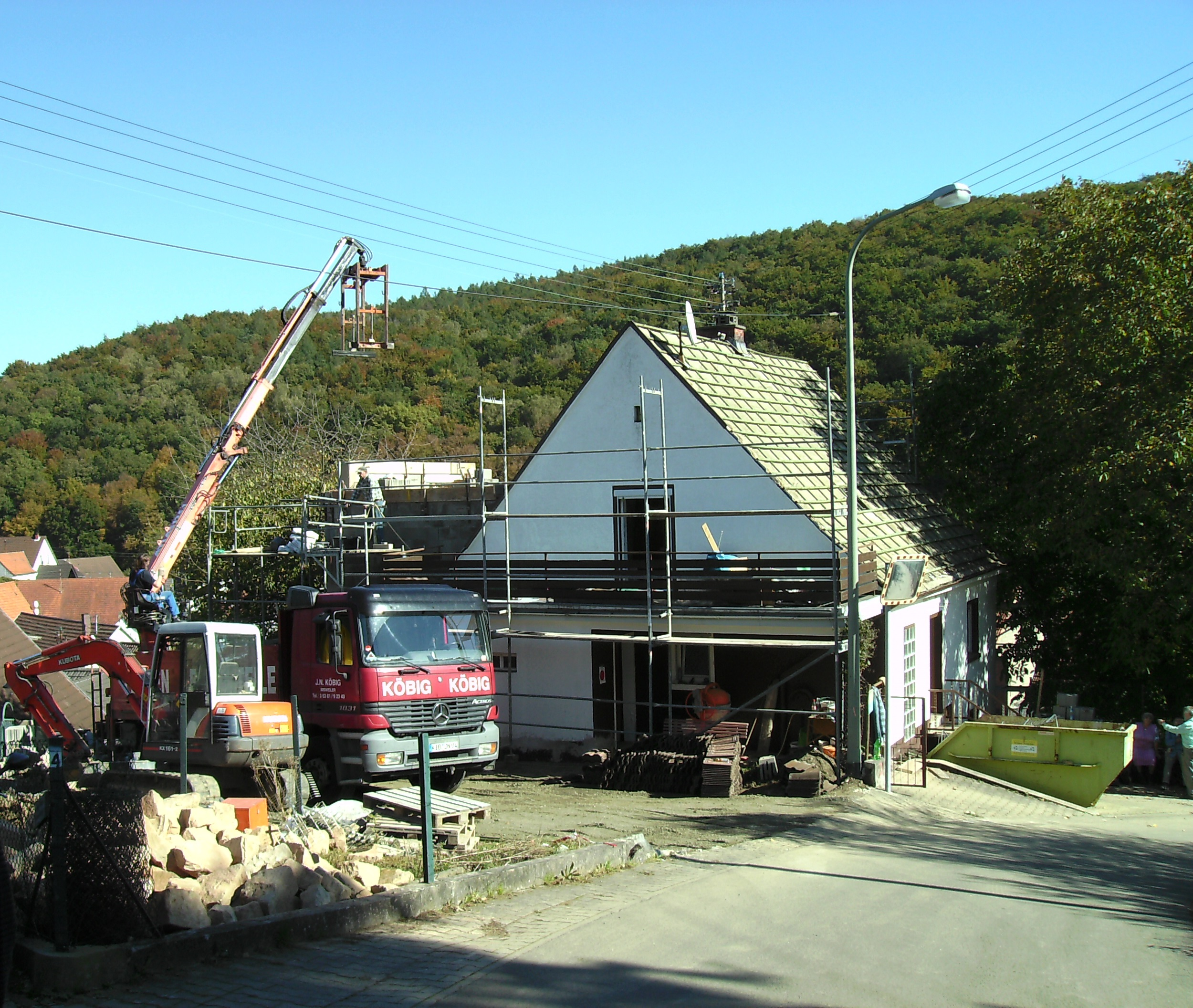 Baustelle: Umbauarbeiten an einem Privathaus